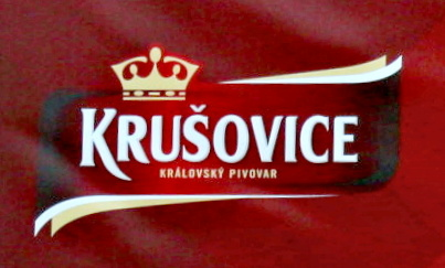 Krušovice pivovar